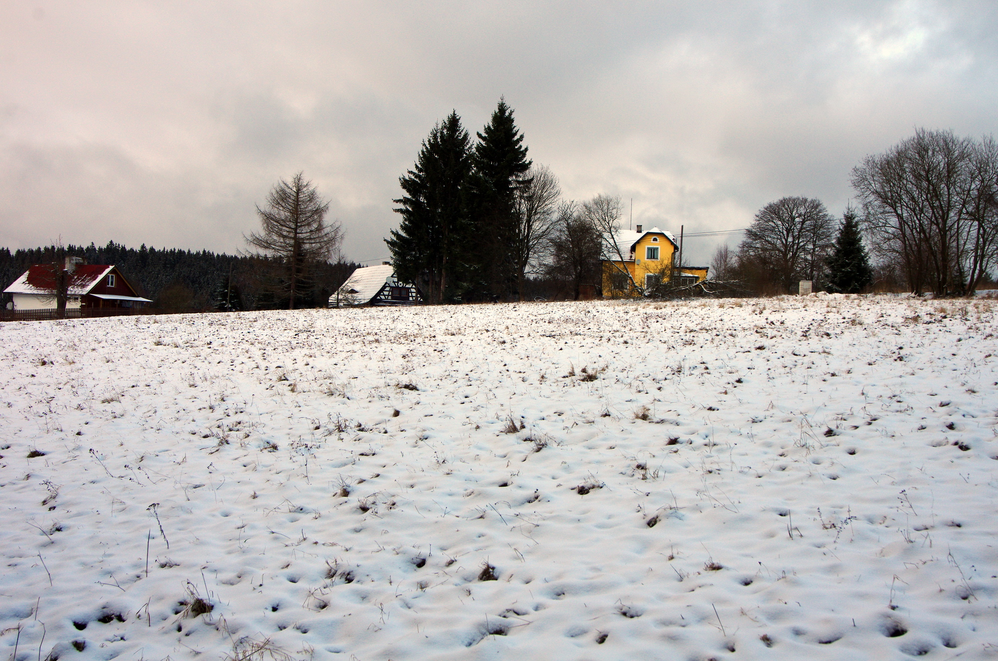 Bernov (část obce Krajková), Krušné hory, okres Sokolov